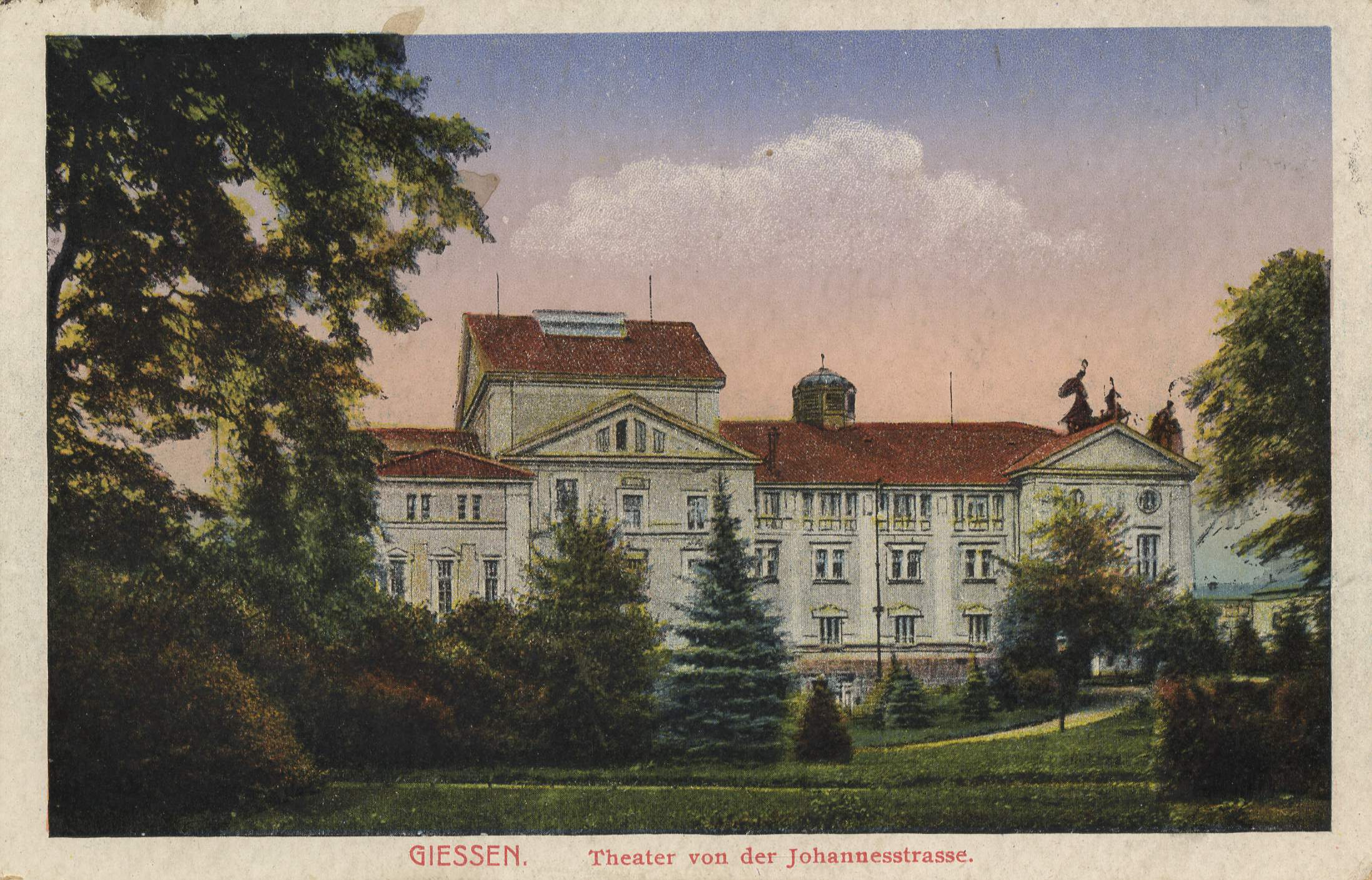 Stadttheater von der Johannesstraße aus gesehen, Gießen, Germany